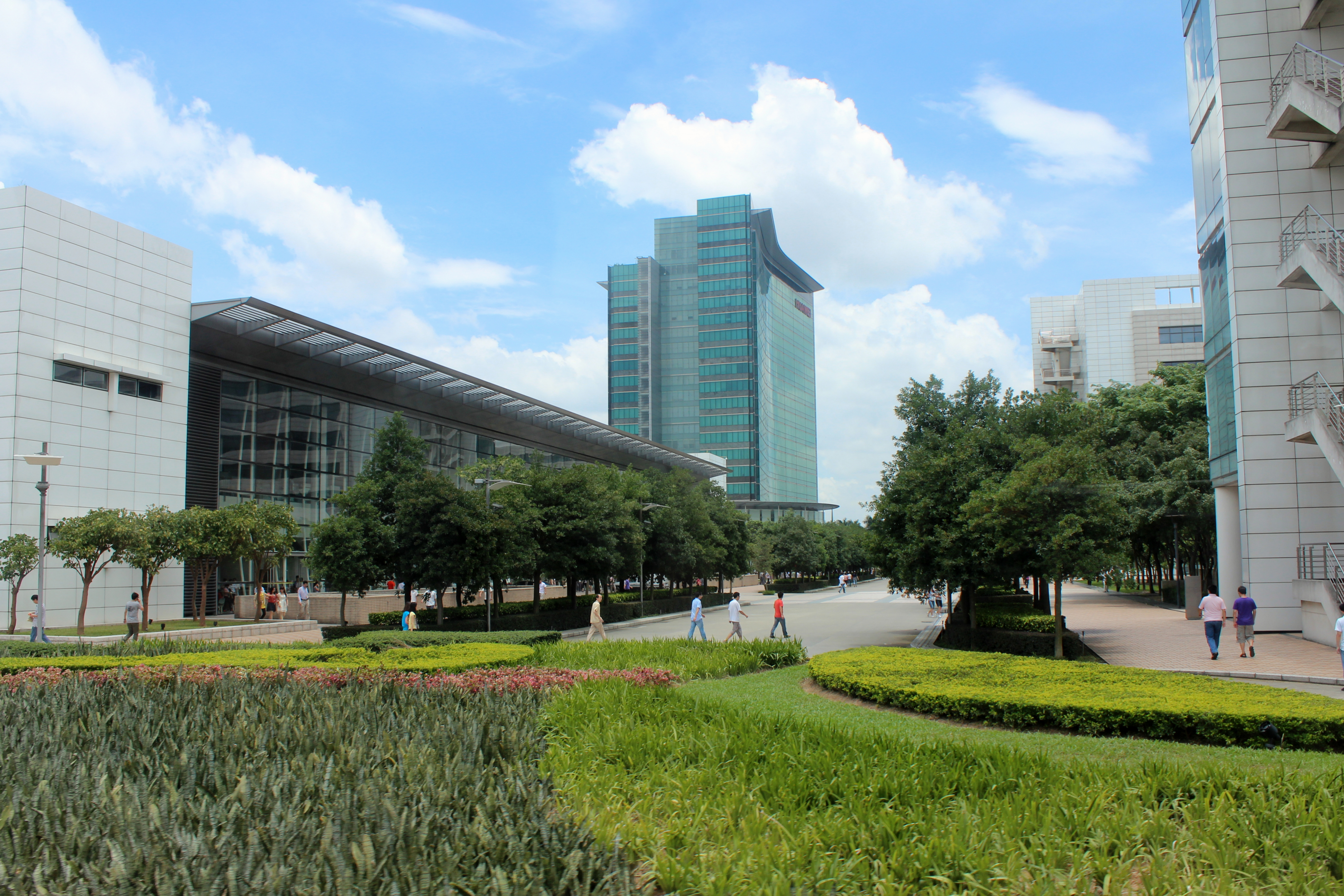 Huawei Headquarter, Bantian, Shenzhen